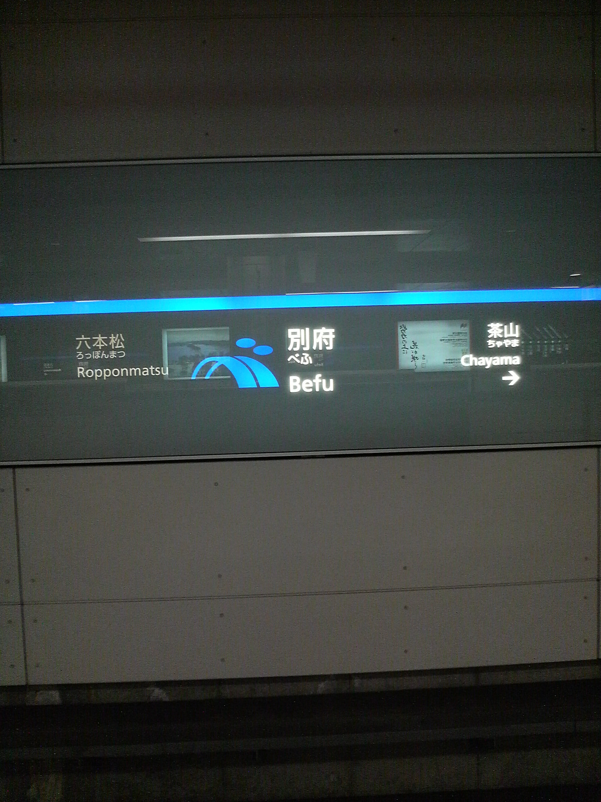 福岡市地下鉄七隈線別府駅の駅名標